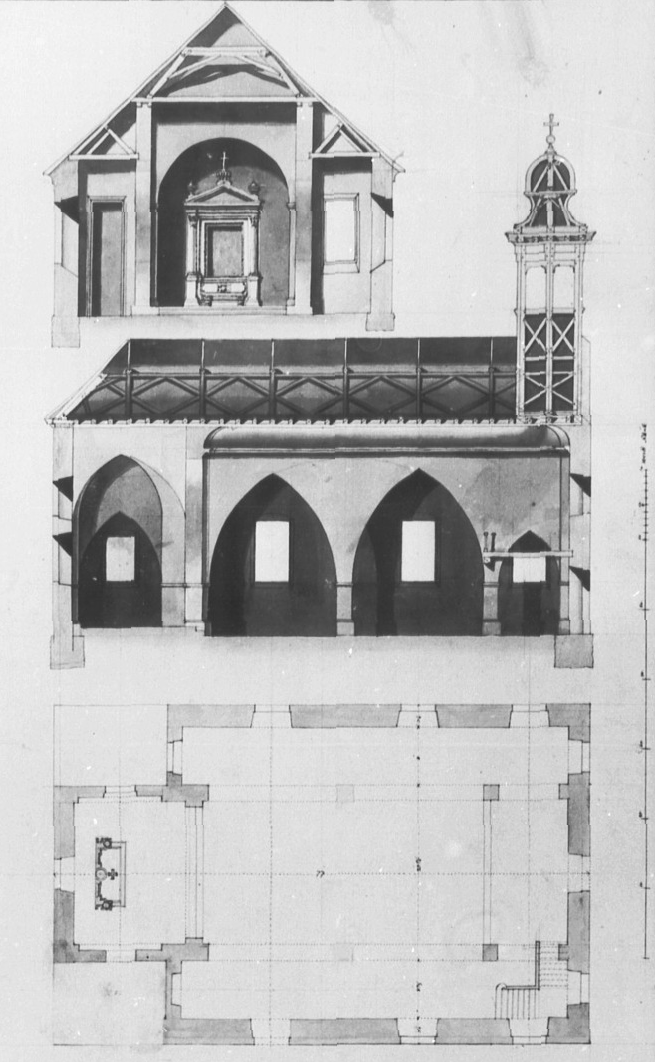 St.-Ägidiuskirche in St. Ilgen (Leimen) 1786/1800